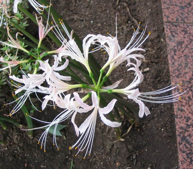 Lycoris houdyshellii ヒガンバナの白花品種